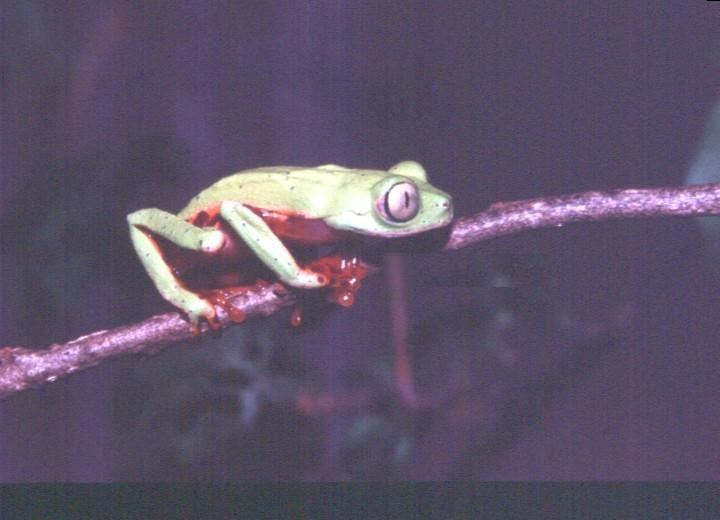 Phasmahyla cochranae